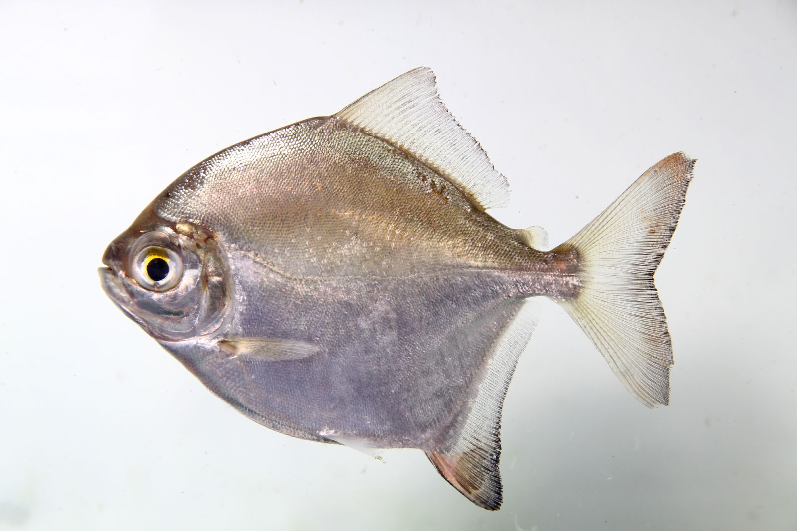 Serrasalmidae Myleus cf rubripinnis